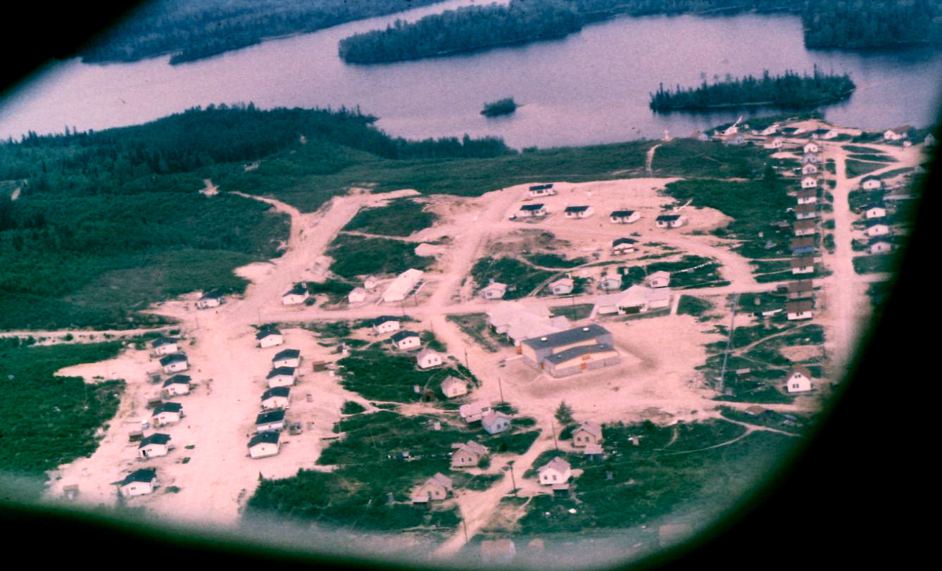 Vue aérienne d'une partie de Manouane, vers 1971